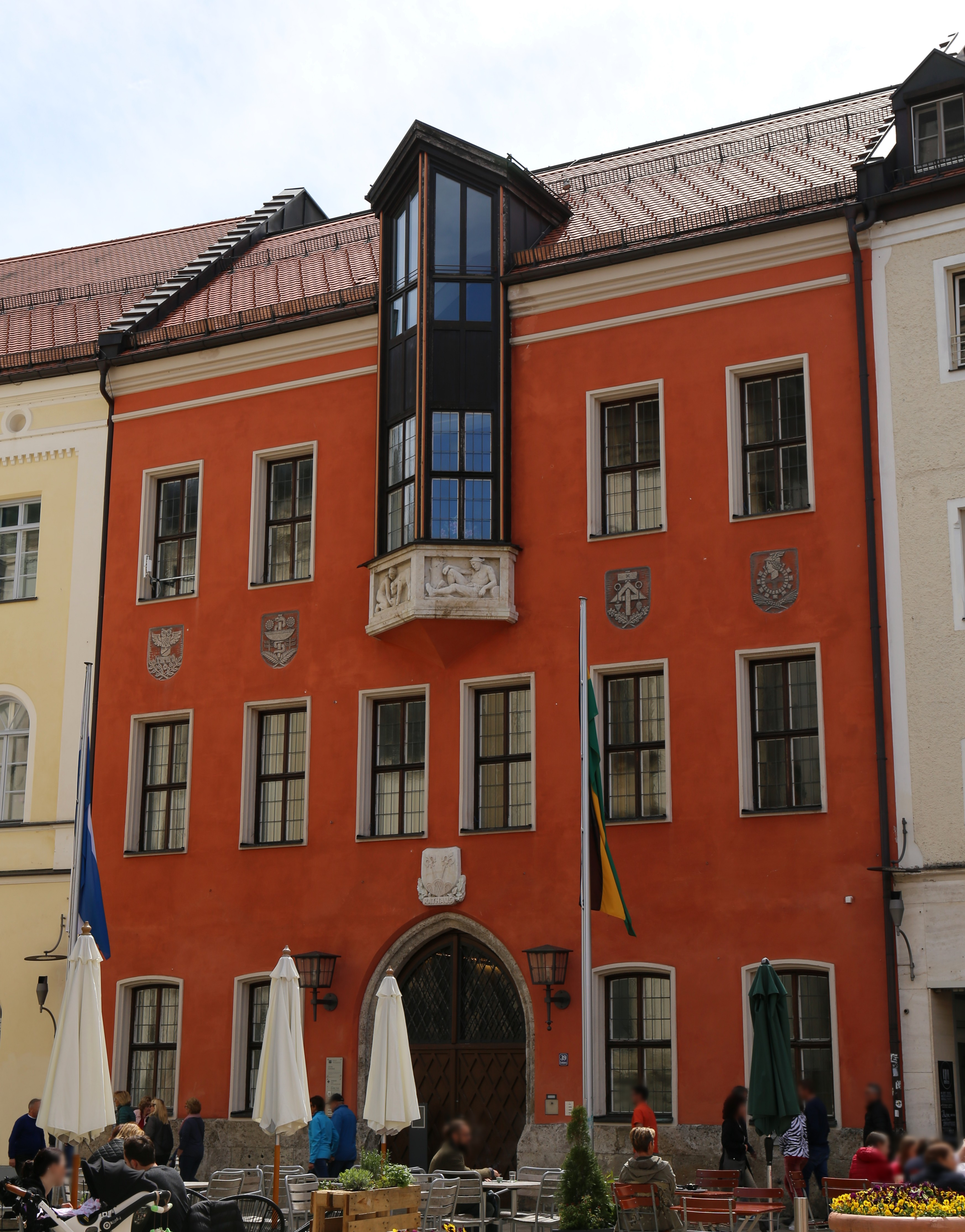 Stadtplatz 38a, Traunstein; Rathaus, dreigeschossiger Bau, in neugotischen Formen nach Entwurf von L. Capeller, 1857, Fassadengestaltung 1947–49 reduziert, Ende der 1990er Jahre im Zuge der Rathauserweiterung überformt; mit Ausstattung